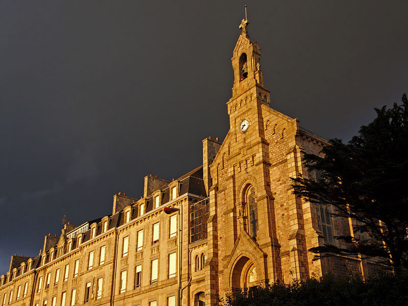 The Chapel in Val André, Côtes d'Armor, France